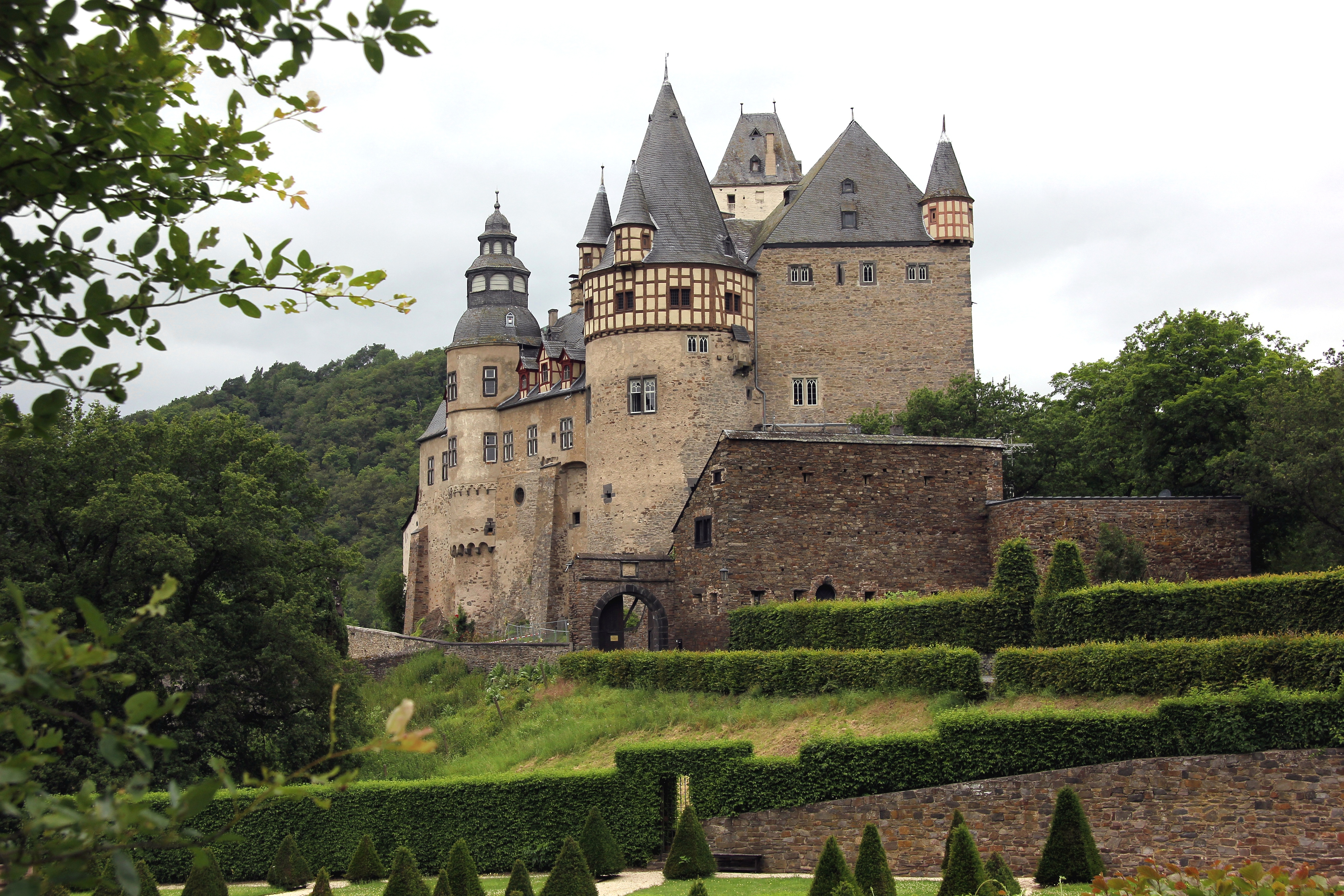 Schloss Bürresheim bei Mayen